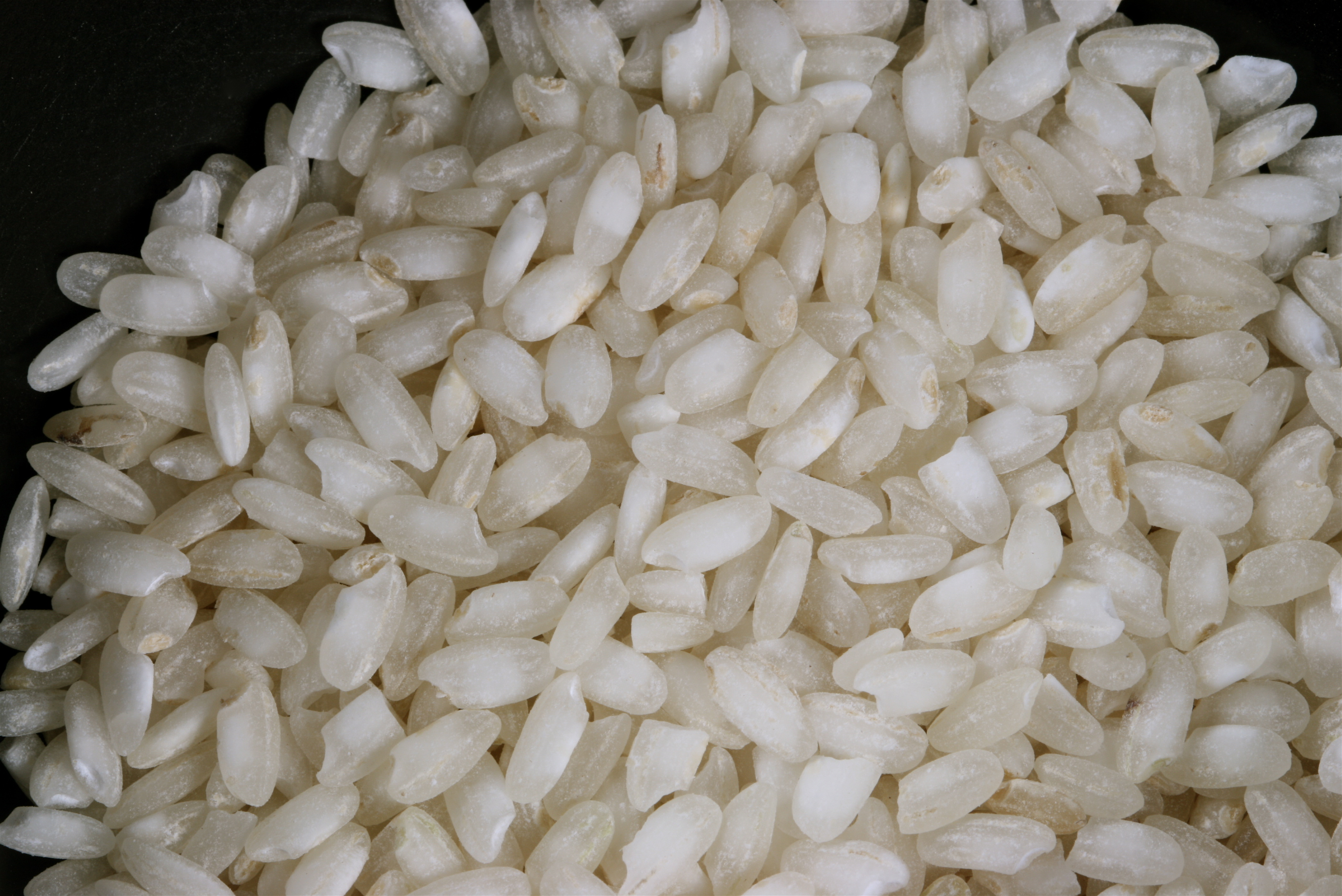 Arborio Rice